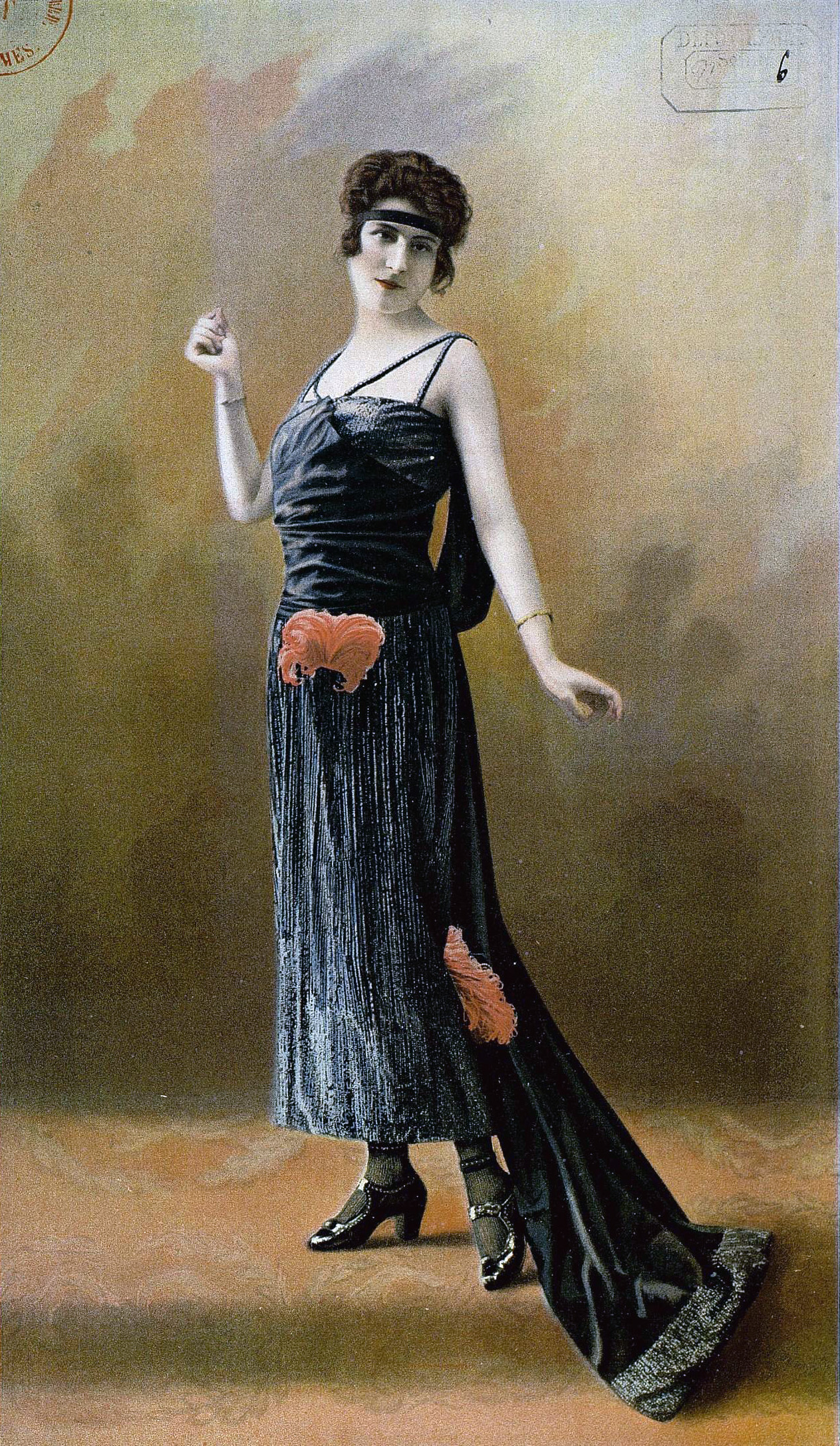 "Robe en tulle bleu saphir entièrement pailleté même ton, touffes de plumes cerise ; haut corselet formant traîne en satin bleu saphir." Cover of Les Modes : Revue mensuelle illustrée des arts décoratifs appliqués à la femme.